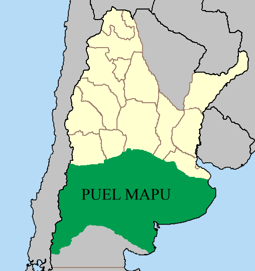 Mapa de Puel Mapu, siglos XVII-XVIII. Sudamérica. Fuentes: José Quidel y Víctor Caniullan (2002), Las identidades territoriales. Bases y Fundamentos desde una perspectiva del conocimiento Mapunche, citado en La reforma agraria y las tierras mapuches: Chile 1962-1975 (2005) de Martín Correa, Raúl Molina Otárola y Nancy Yáñez Fuenzalida, Santiago, LOM Ediciones, ISBN 9562827097, página 18. Comision de Trabajo Autónomo Mapuche (2003), Informe de la Comisión Verdad Histórica y Nuevo Trato 2003, Volumen III, Tomo II, Capítulo II Territorio y Tierras Mapuche, "Procesos territoriales en el mapunche wajontu mapu: prehistoria y resistencia anticolonial (siglo XVI – XVIII)". Equipo Mapuche, La Conquista del Desierto: fue una guerra genocida contra Nación Mapuche en Argentina